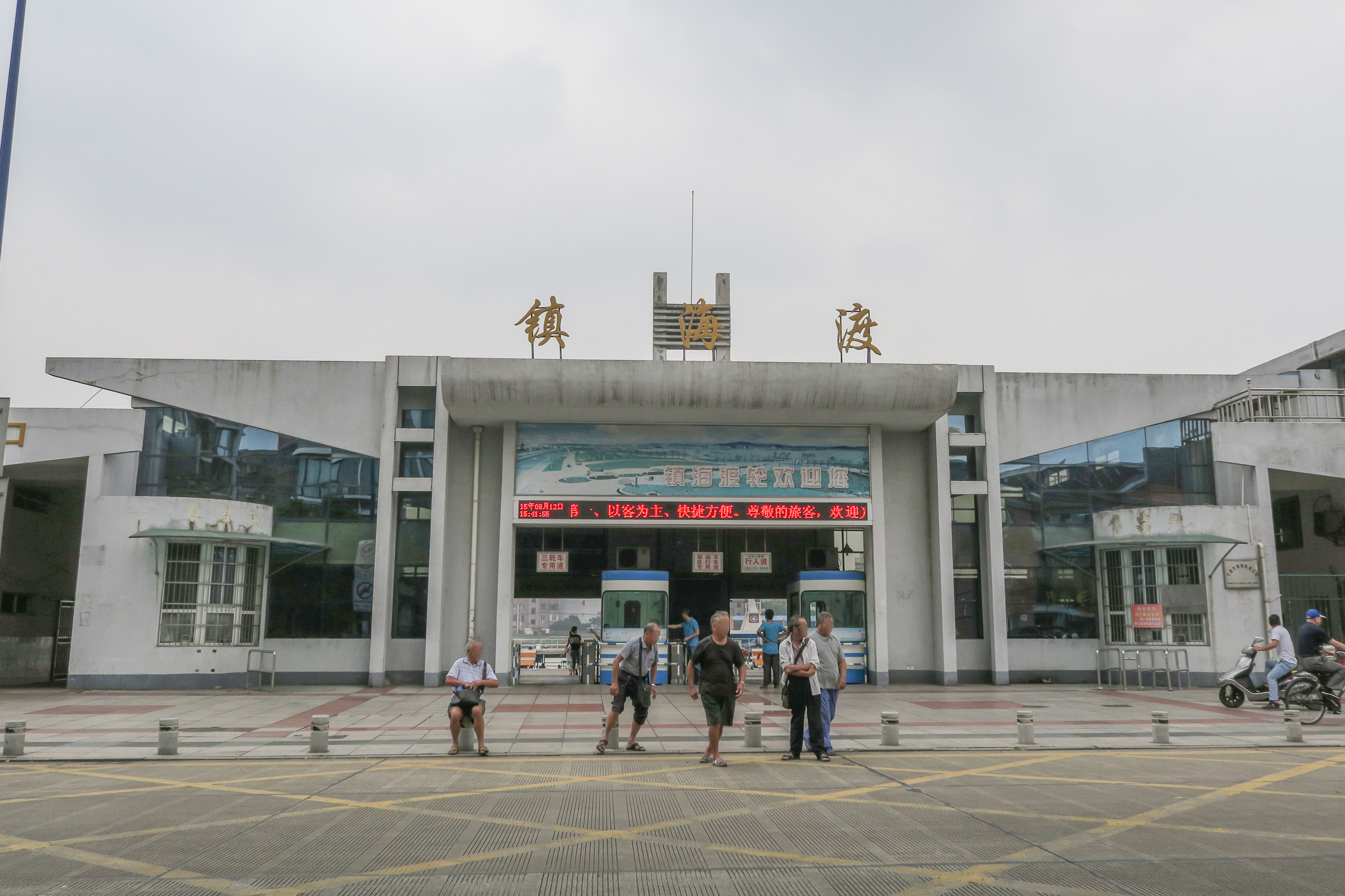 镇海渡，2015-09-12